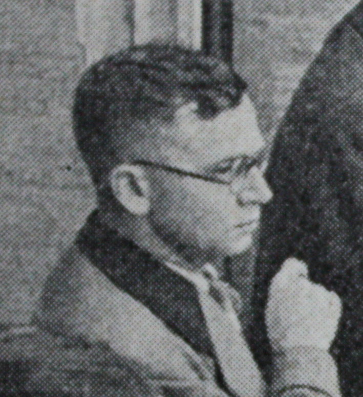 Georg Fahrbach (1903-1976) beim Deutschen Wandertag in Stuttgart 1938